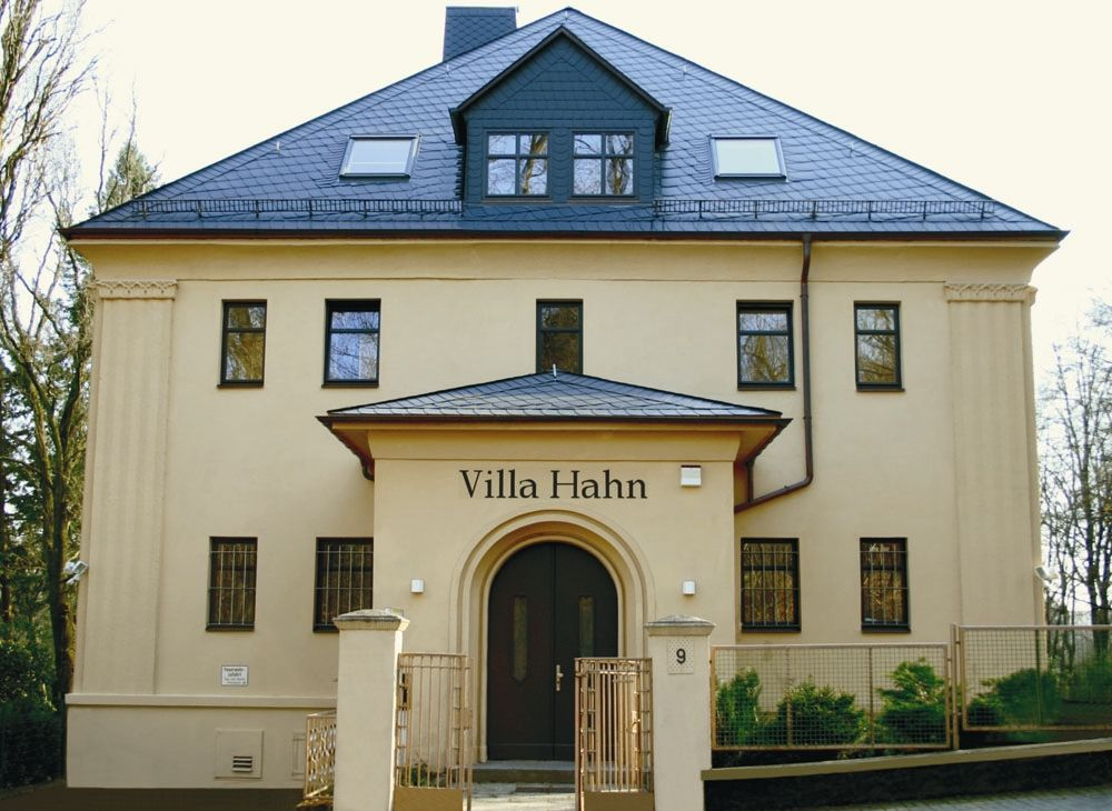 Deitsch: Die unter Denkmalschutz stehende Villa Hahn wurde 1923 von dem Architekten Eugen Weber in Chemnitz erbaut. Im sächsischen Chemnitz wurde einst der Grundstein des deutschen Maschinenbaus gelegt und um die Wende vom 19. zum 20. Jahrhundert galt es als die reichste Stadt Deutschlands. Die Villa Hahn ist ein Bestandteil des gesamten historischen Villenensembles des Chemnitzer Stadtteiles Kapellenberg, dem ehemaligen „Stollberger Viertel“, wie dieses Gebiet einst genannt wurde. Hier siedelten sich um 1900 viele wohlhabende Chemnitzer Bürger an. Eingebettet in ein wunderschönes Parkgrundstück, beeindruckt das massive Gebäude mit seiner harmonischen Symmetrie und vereint den damals aufkommenden sachlicheren Baustil mit den traditionellen Elementen des Neo-Klassizismus. Betrachtet man die Villa von ihrer Rückseite, erschließt sich einem die einstige Schönheit im besonderen Maße.